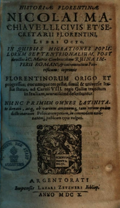 Niccolò Machiavelli, Historiae_Florentinae (1610) title page